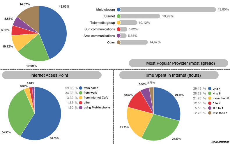 Moldnet Diagrams